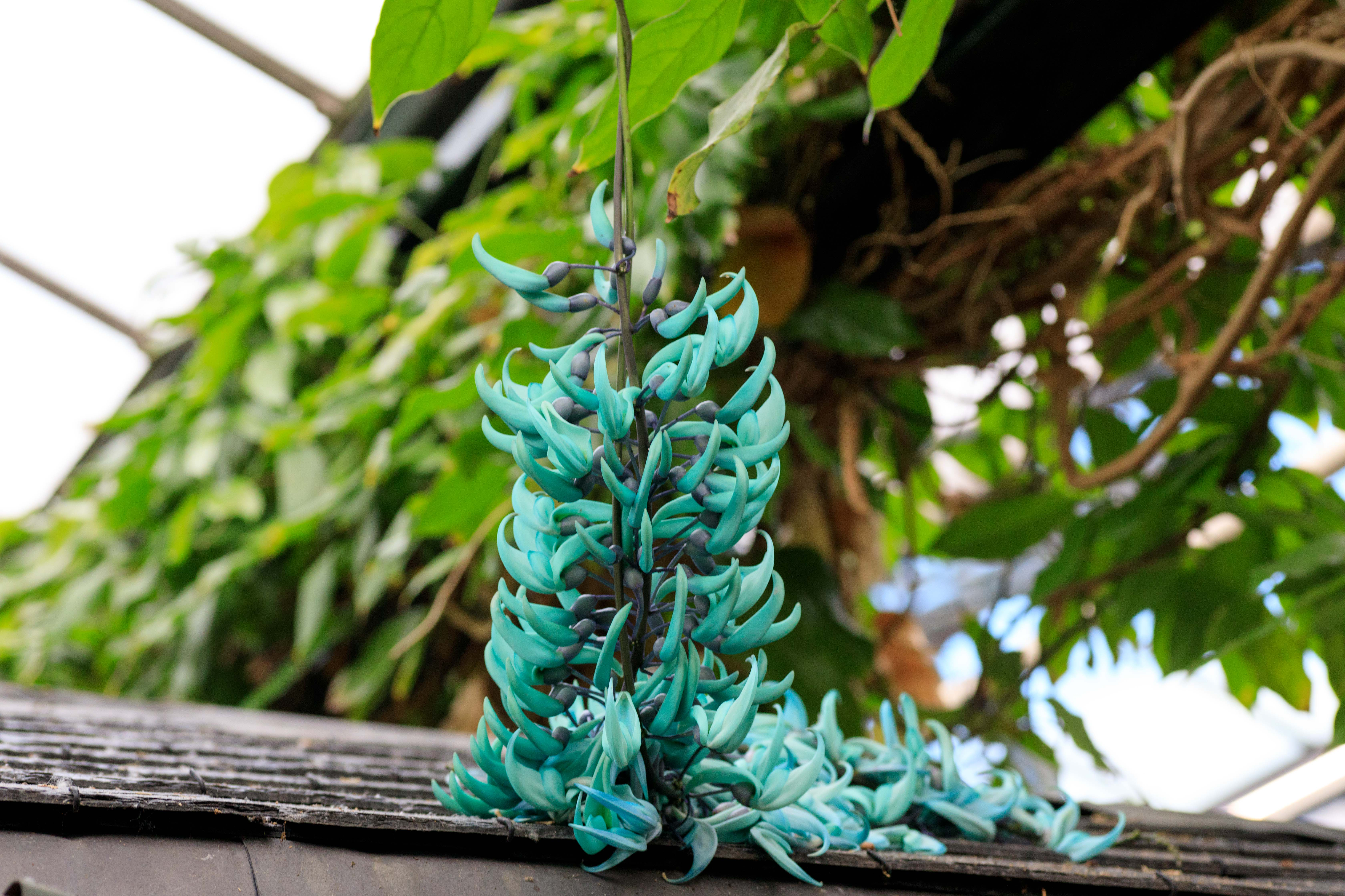 Bloeiende Jadebloem, deze groet op het dak in de kas van Watertuin Naaldwijk